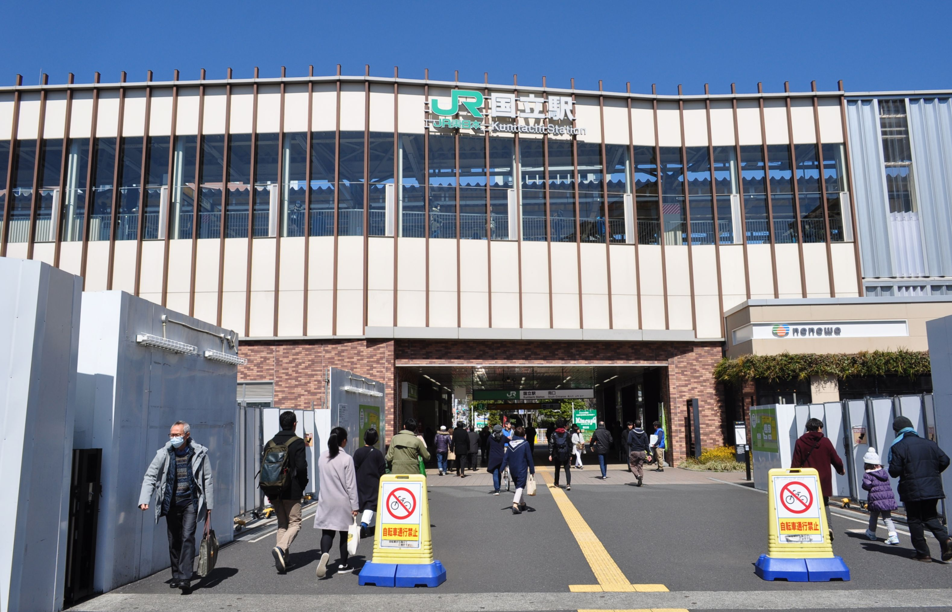 国立駅 南口